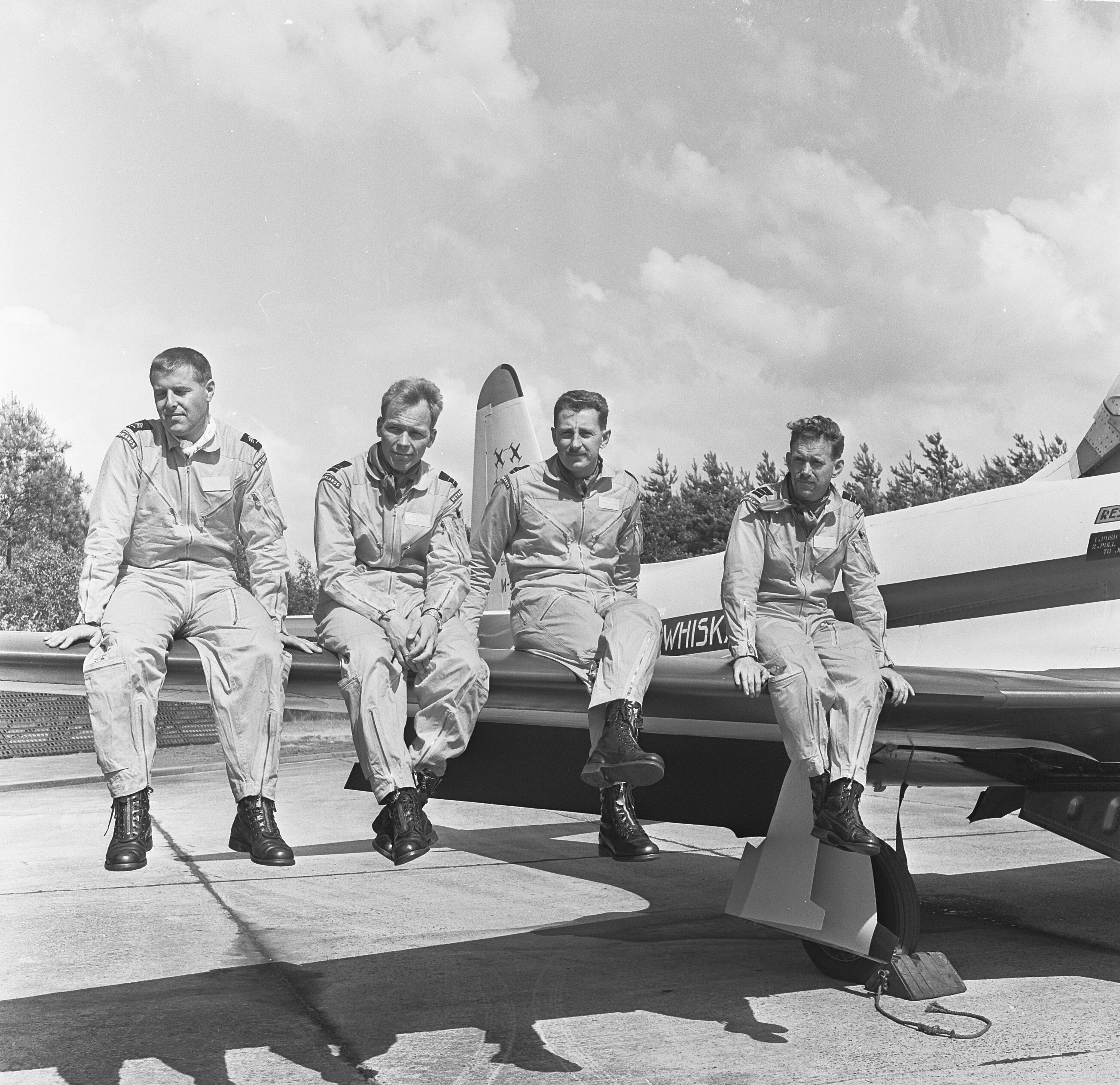 Collectie / Archief : Fotocollectie Anefo Reportage / Serie : [ onbekend ] Beschrijving : Nederlands stunt-team Whisky Four tien jaar, het team op een van hun kisten Datum : 22 juni 1966 Trefwoorden : stunt-teams Fotograaf : Voets, Jan / Anefo Auteursrechthebbende : Nationaal Archief Materiaalsoort : Negatief (zwart/wit) Nummer archiefinventaris : bekijk toegang 2.24.01.03 Bestanddeelnummer : 919-2917